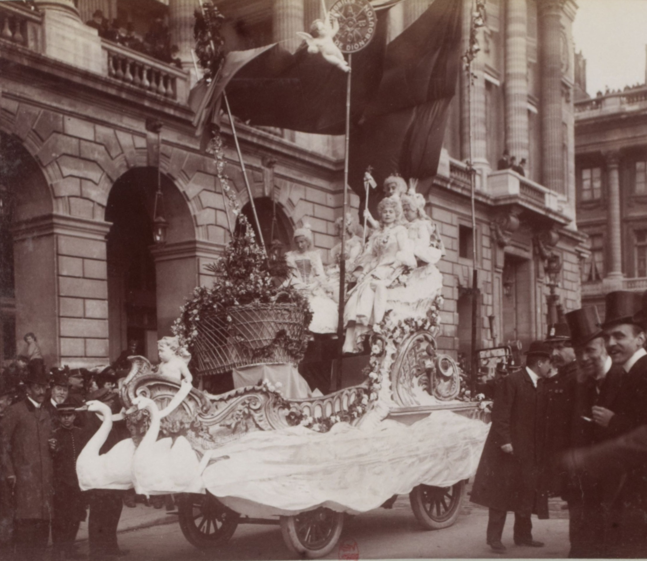 [Collection Jules Beau. Photographie sportive] : T. 20. AnnÃ©e 1903 / Jules Beau : F. 27v. Mi-CarÃªme en automobile, [Buffalo], 19 mars 1903